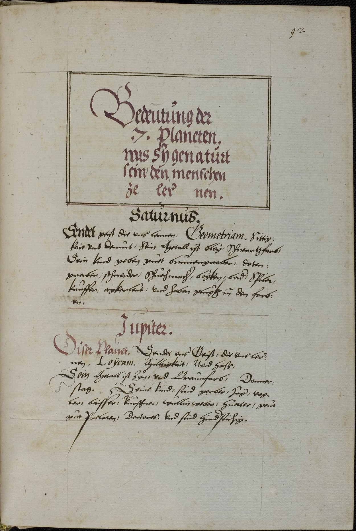 Codex Palatinus germanicus 6, Blatt 92r der Handschrift: 7 Planeten (Verbindung jedes "Planeten" mit einer Wissenschaft, hier: Saturn/Geometrie, Jupiter/Logik)